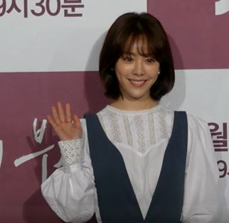 11일 오후 서울시 영등포구 여의도 콘래드 호텔 파크볼룸에서 JTBC 새 월화드라마 '눈이 부시게' 제작발표회가 열려 배우 남주혁X한지민X김혜자X김가은X손호준이 참석해 포즈를 취하고 있다.